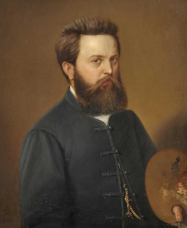 Jan Kostěnec - autoportrét